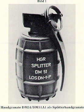 Splitterhandgrante DM51 der Bundeswehr